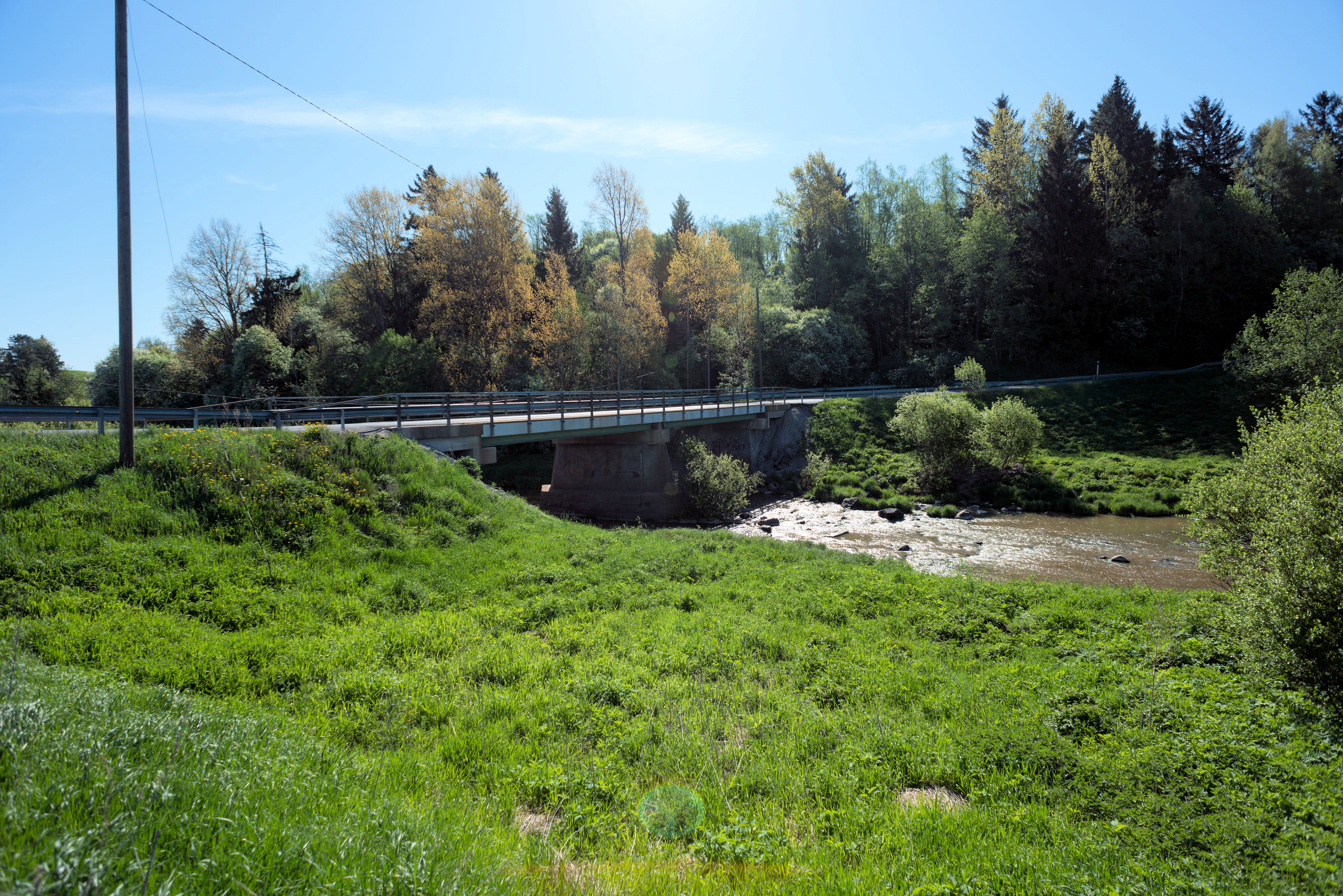 Illikoskentien silta Perttelissä